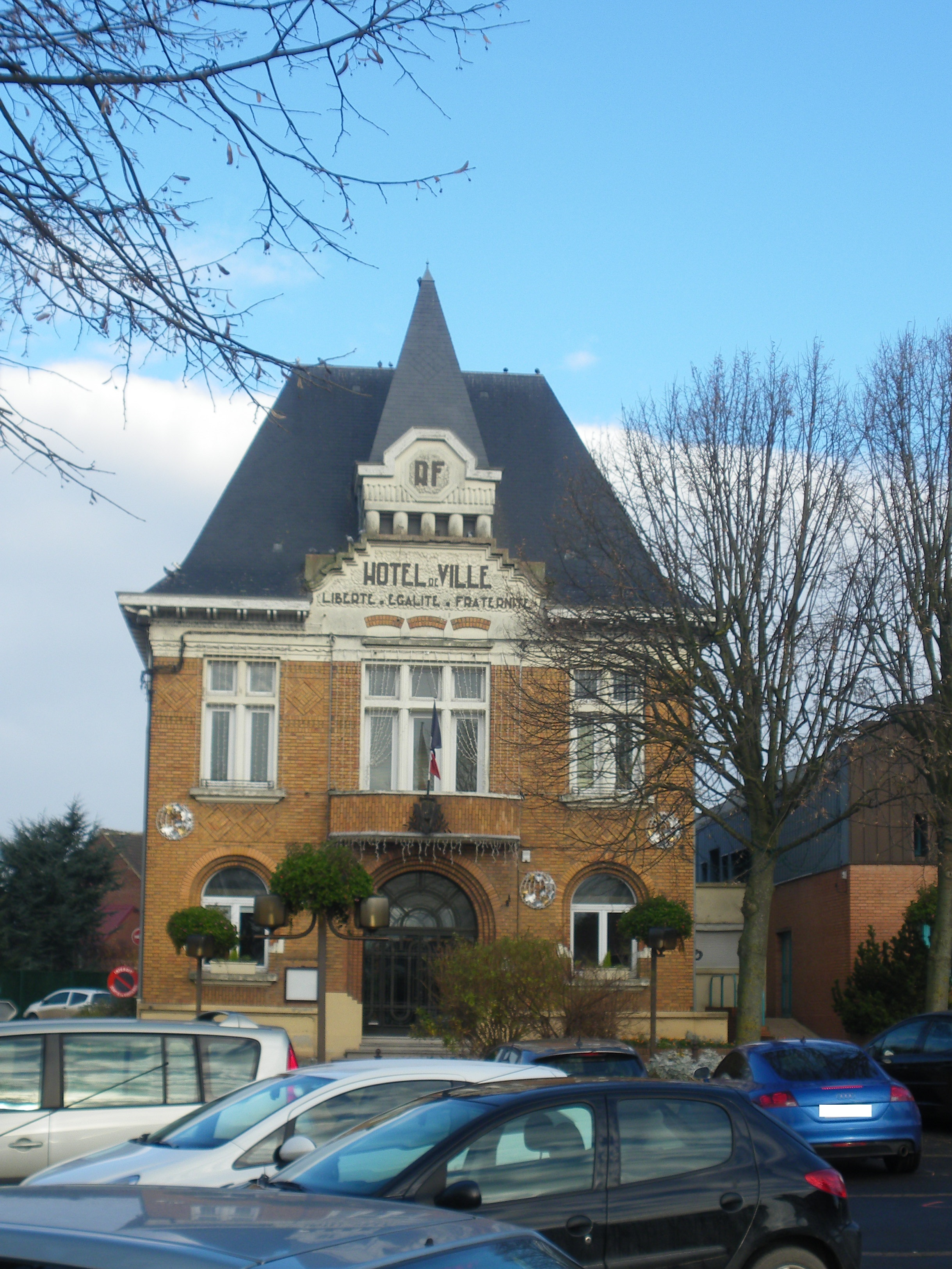 Vue de l'hôtel de ville de Vermelles.